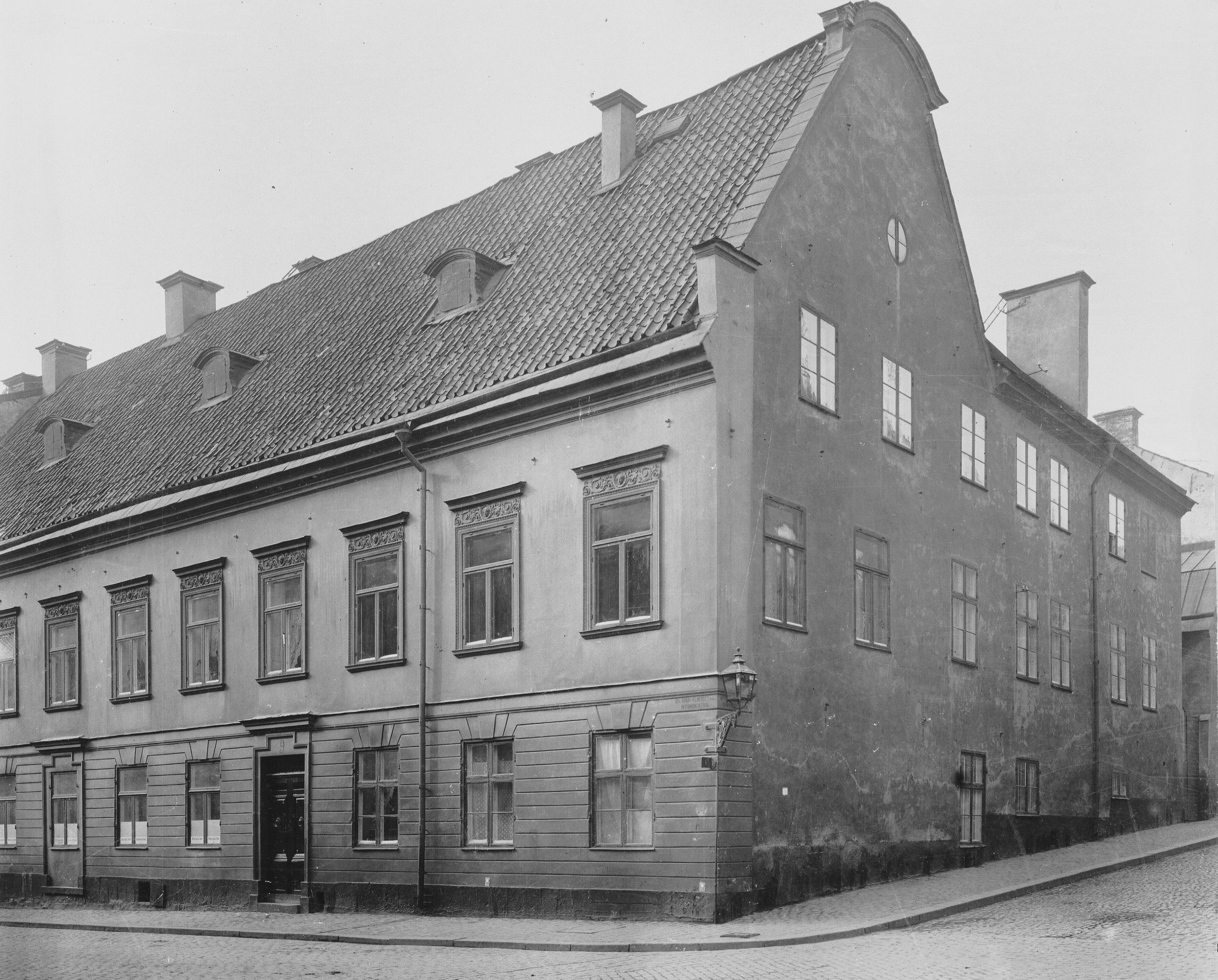 Martin Kammeckers stenhus, Nybrogatan 9 (revs 1907)